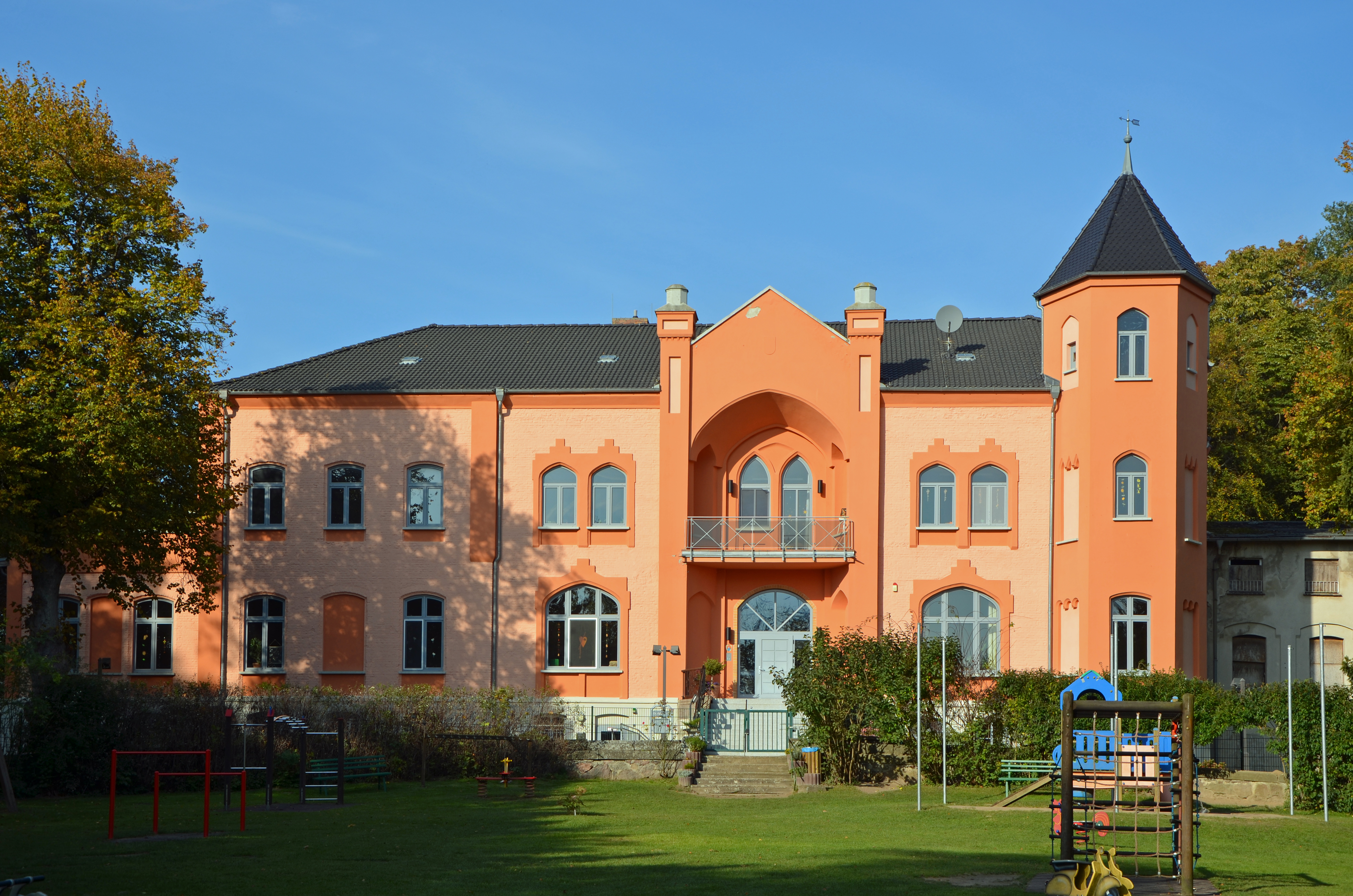 Schloss Ziesendorf